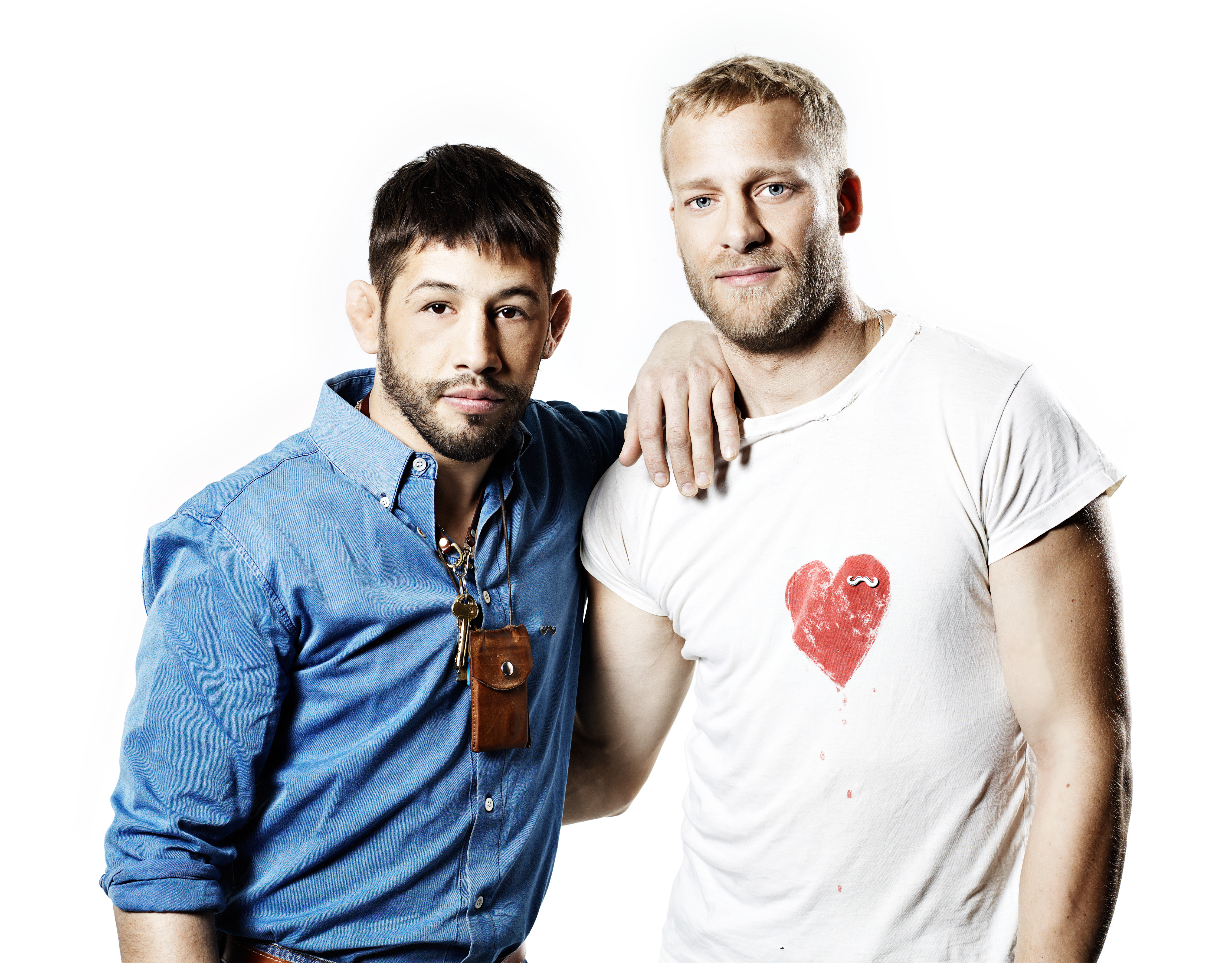 Kampsportarna och programledarna Musse Hasselvall (till vänster) och Andreas Halldén.